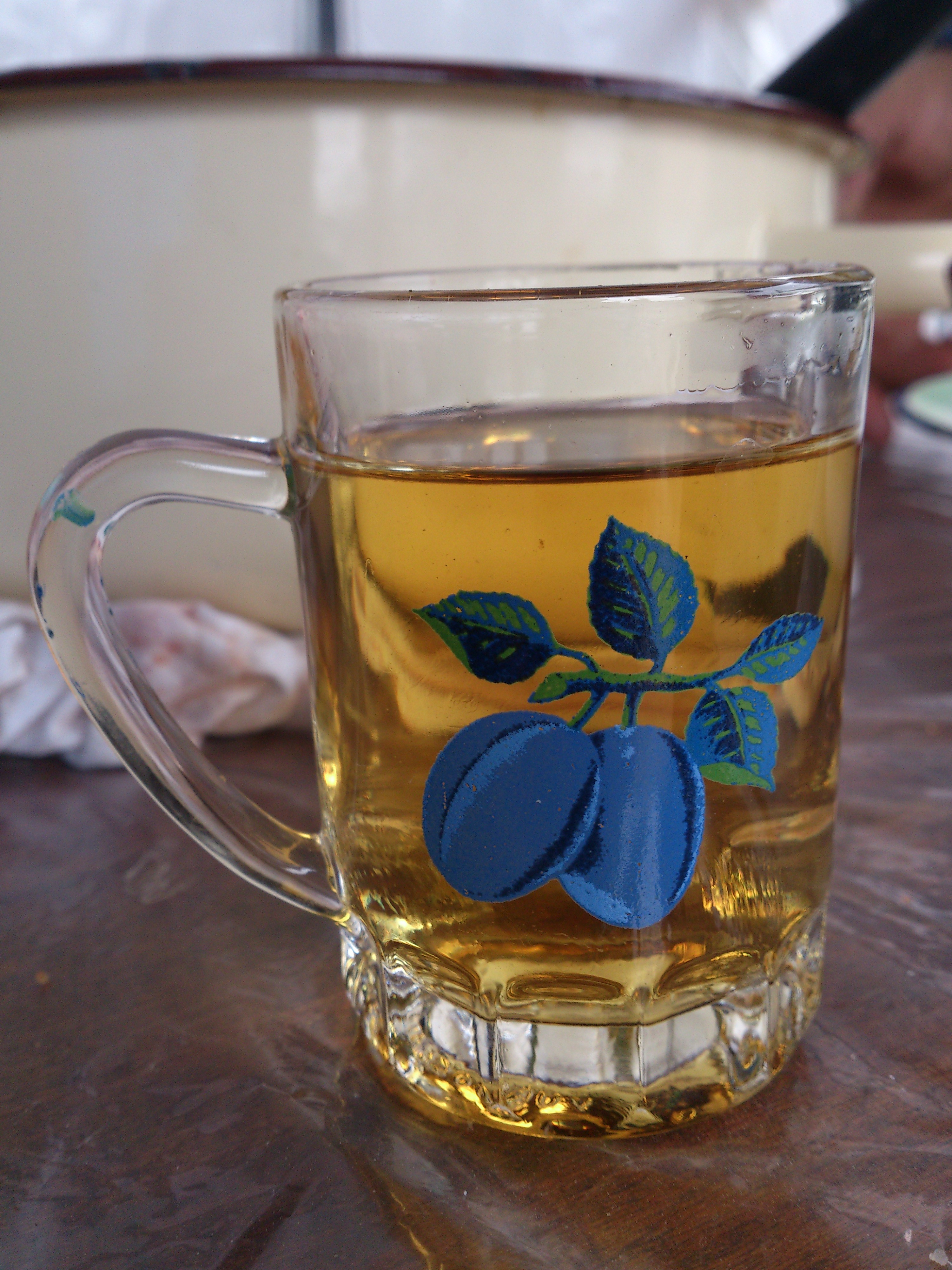 Vruća rakija, Šarani.